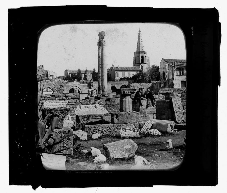 Théâtre antique d'Arles (Bouches-du-Rhône). 1902. Vue d'ensemble des ruines du théâtre. Au premier plan morceaux de piliers et de colonnes sculptés ; au second plan au centre colonne géminée, à droite trois personnages sur gradins ; en arrière plan façades d'habitations, clocher de l'église du couvent des Cordeliers.